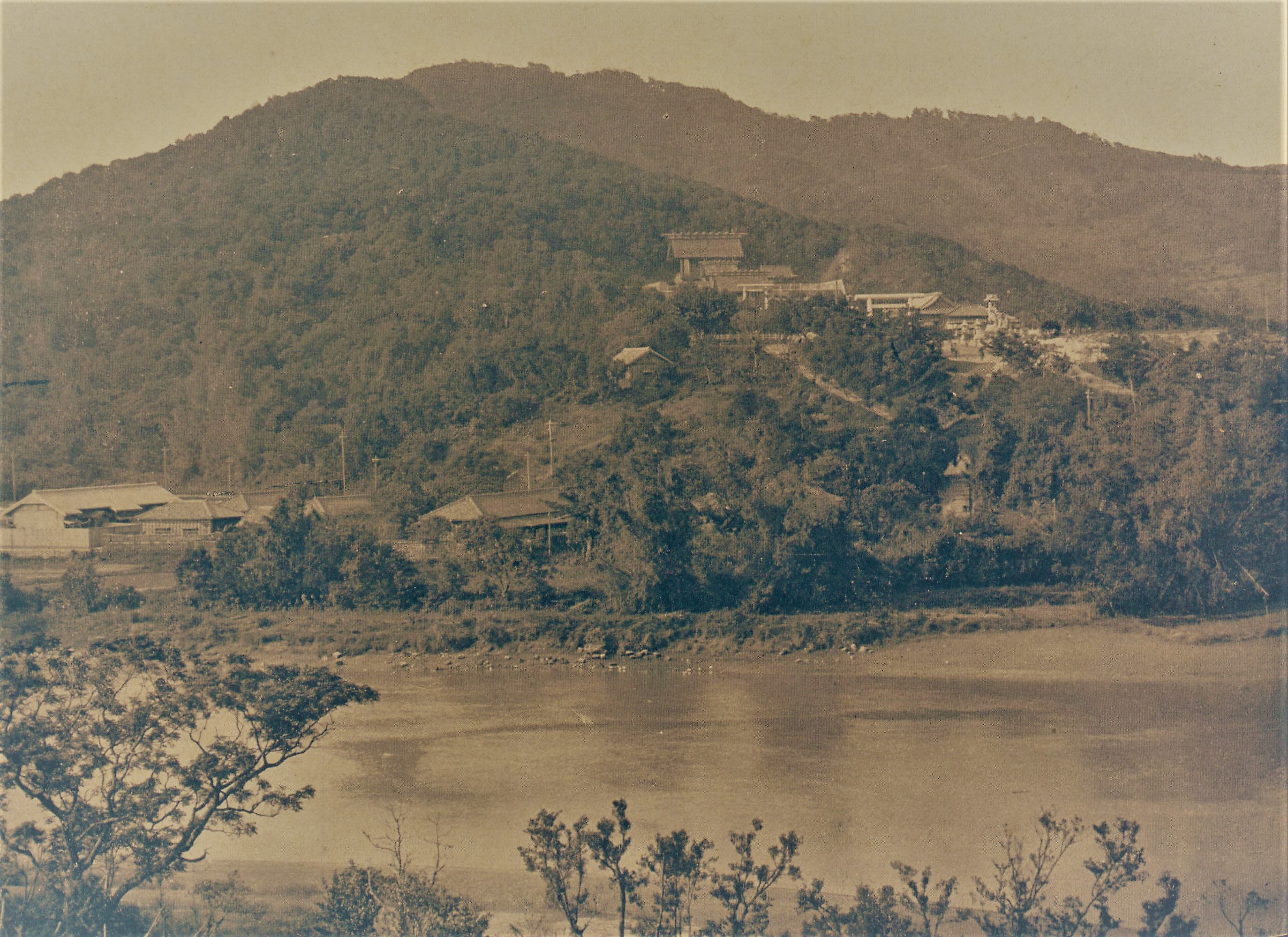 從圓山公園看臺灣神社（臺北廳管內）